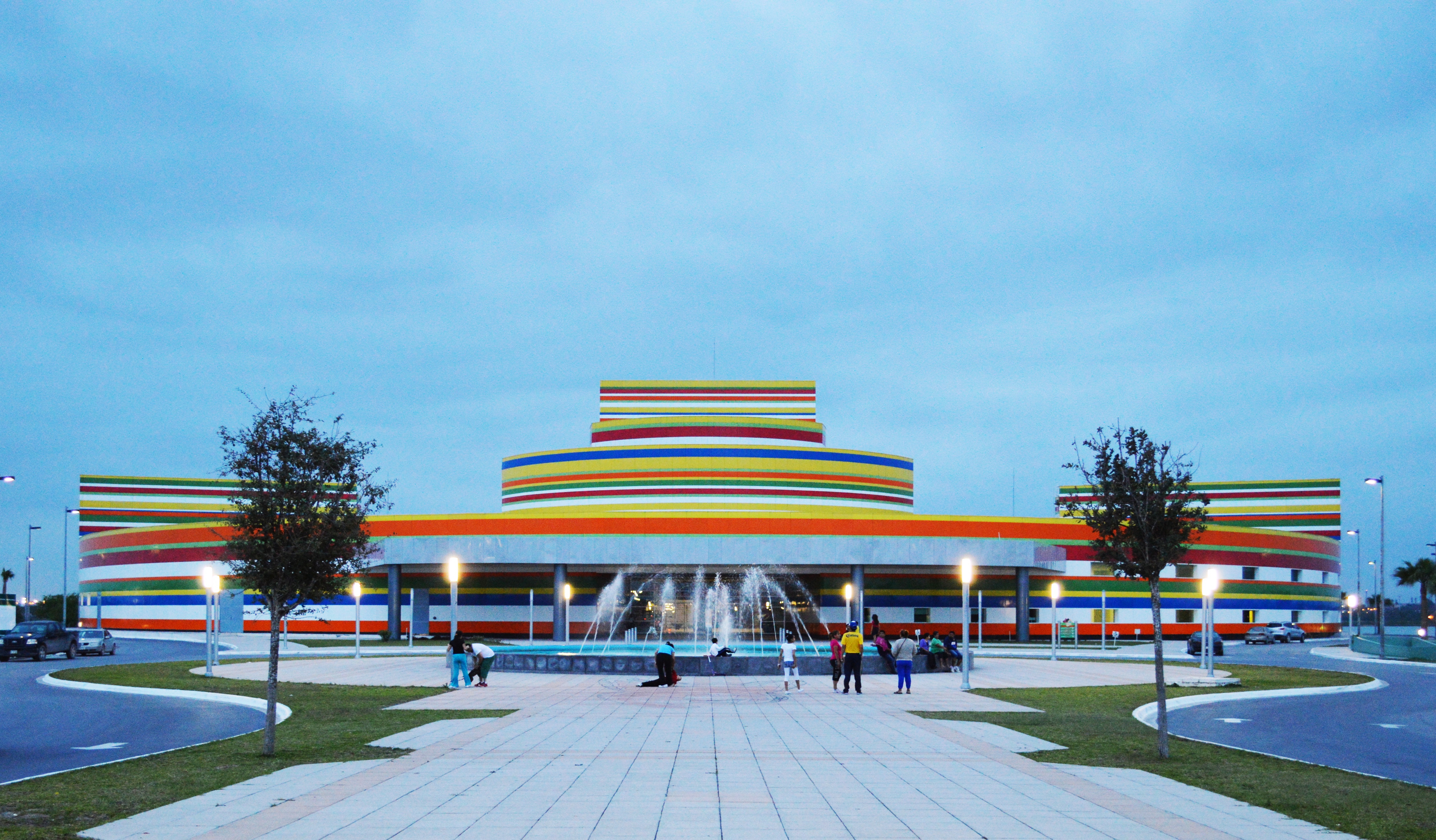 Con ésta construcción, Reynosa tiene un lugar de esparcimiento.